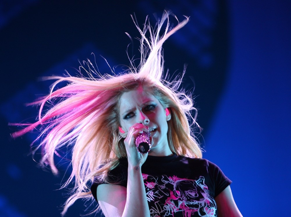 Avril Lavigne in China